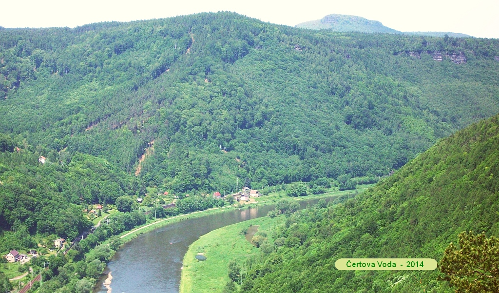 Pohled na Čertovu Vodu z Růžové vyhlídky